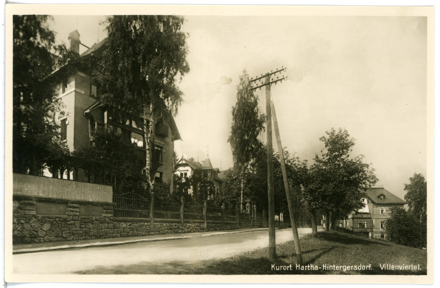 Hartha; Villenviertel This postcard is from publisher Brück & Sohn in Meißen ( postcard has a unique number 24228 and is available in a higher resolution at the publisher. This images was uploaded in a cooperation project between Wikipedians and the publisher.